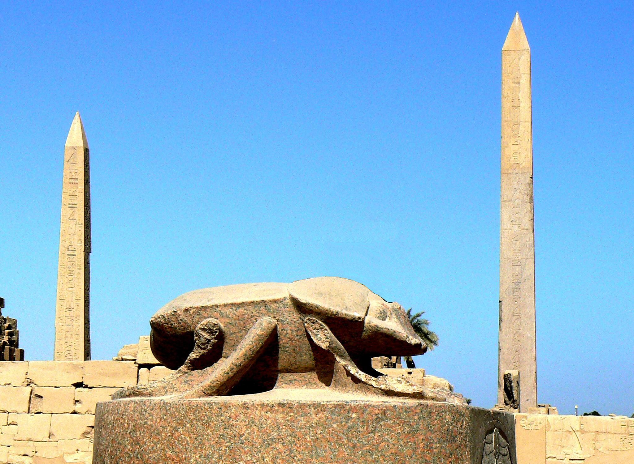 eigen fotobewerking januari 2007 Karnak Ben Pirard